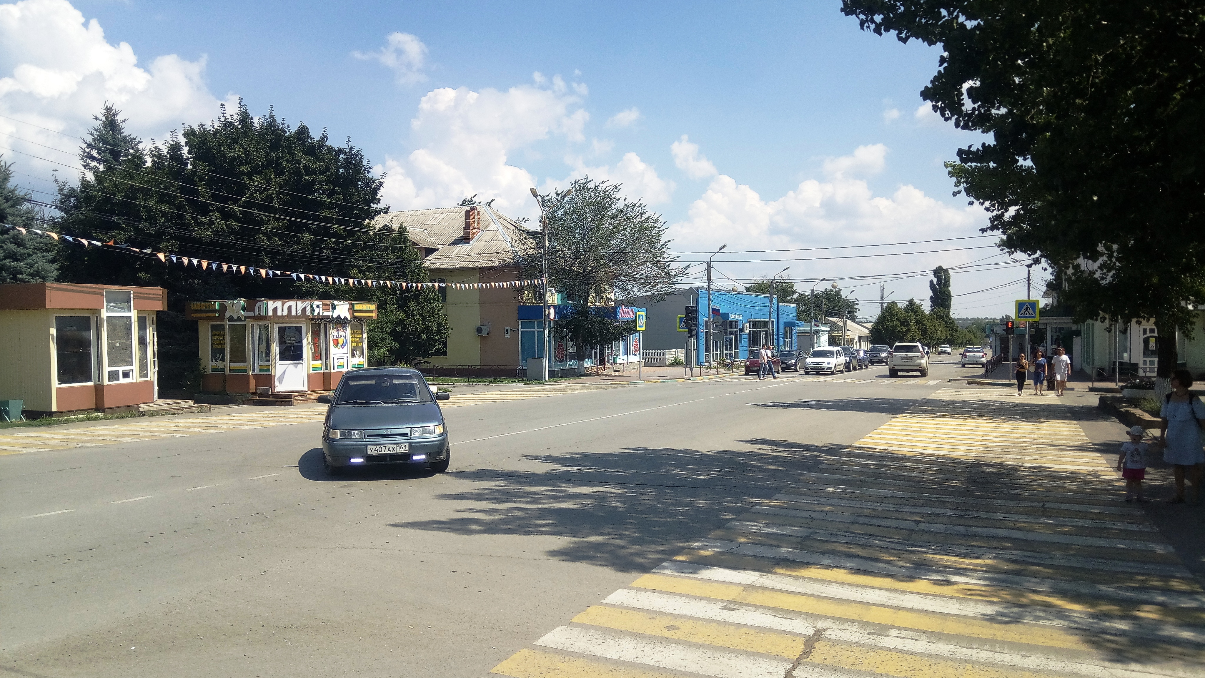 Улица Горького (Донецк РФ)